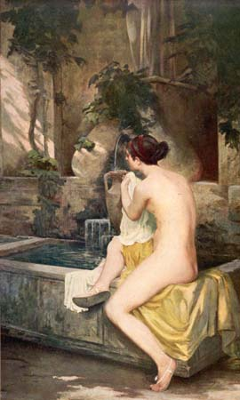 A la fontaine